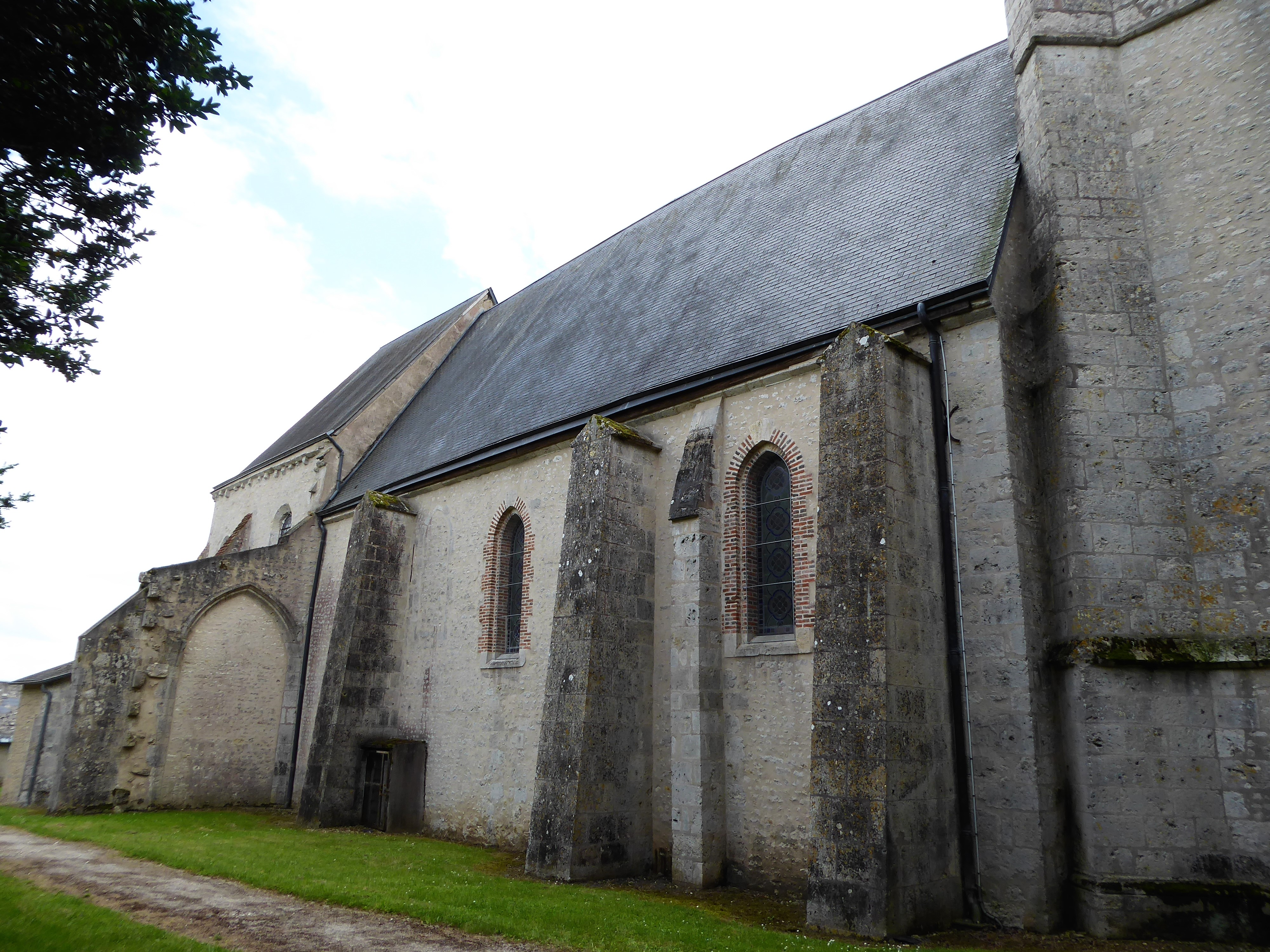 mur nord de l'église Saint-Pierre, Lumeau, Eure-et-Loir, France.